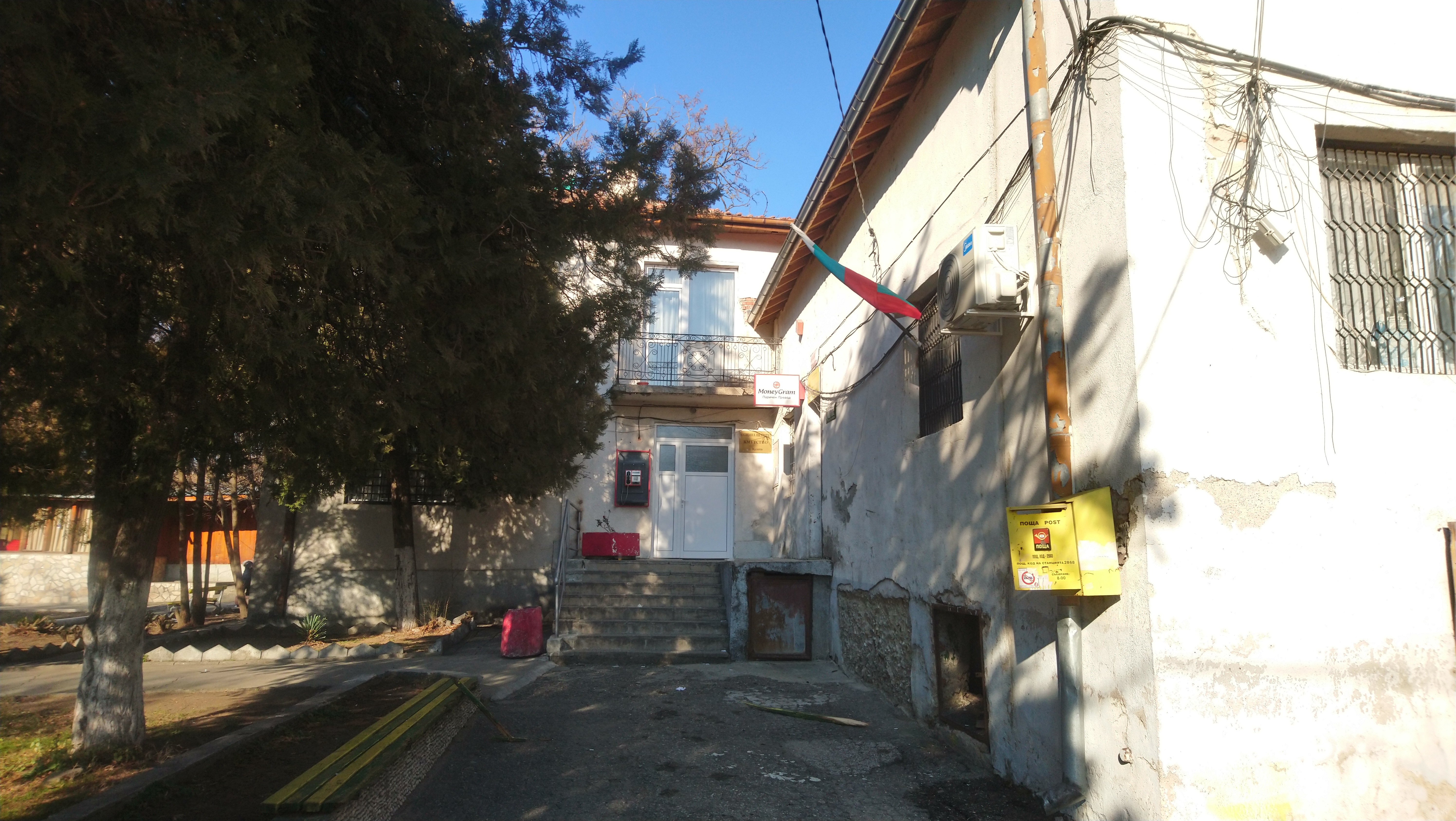 Кметство на село Кулата